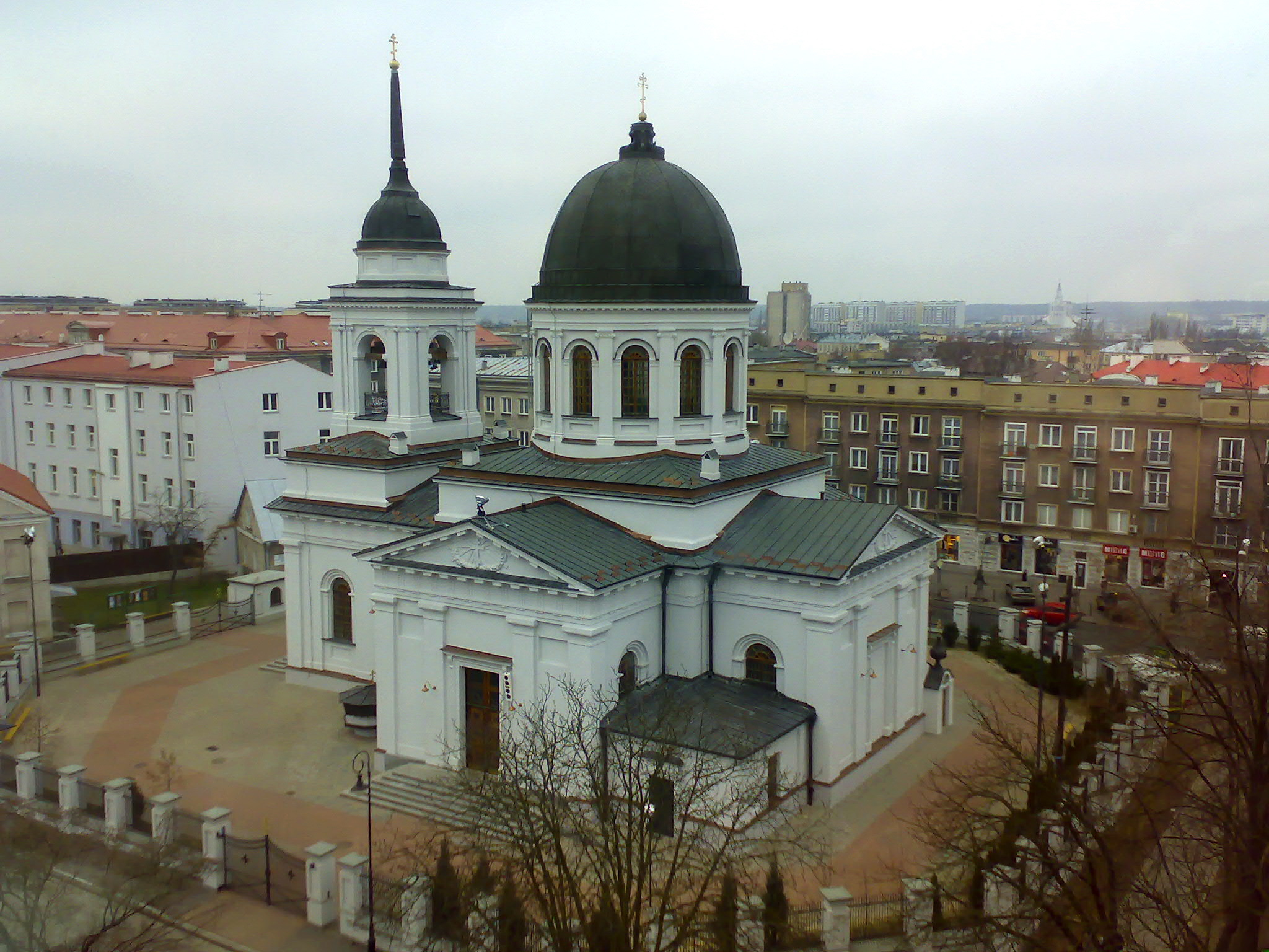 Sobór św. Mikołaja Cudotwórcy przy ul. Lipowej 15 w Białymstoku.